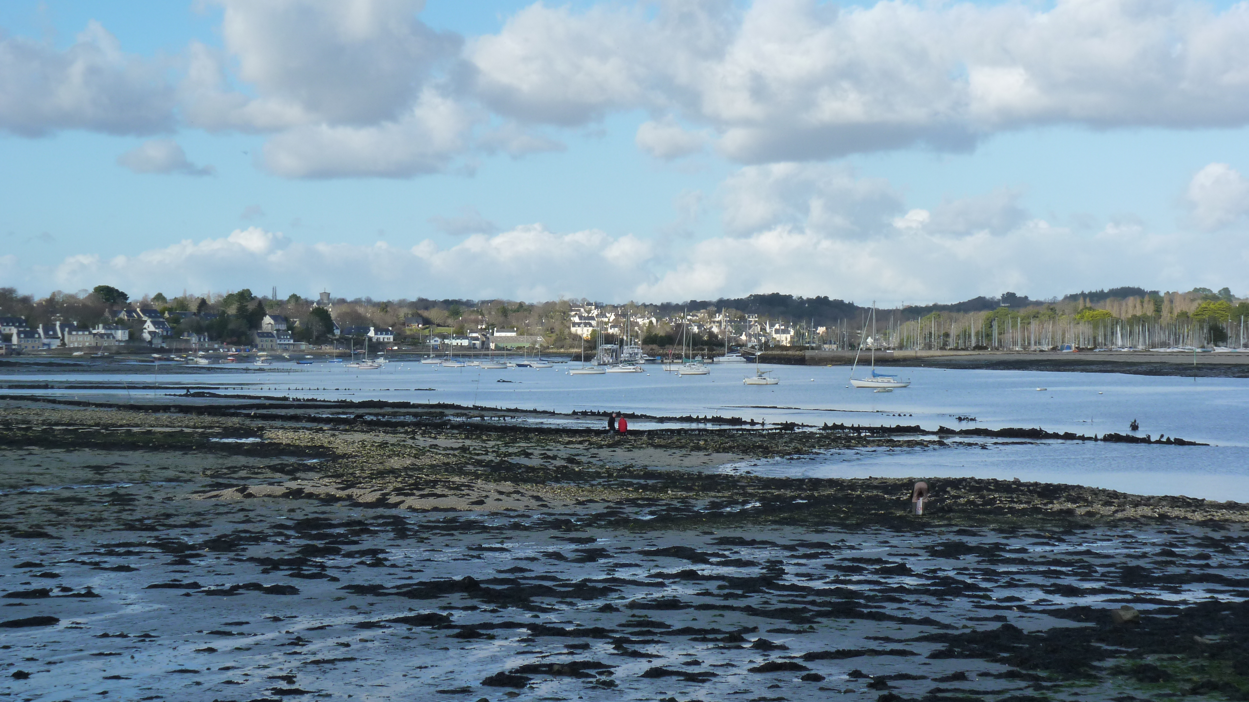 Vue sur La Forêt Fouesnant depuis le Cap Coz en Janvier 2011